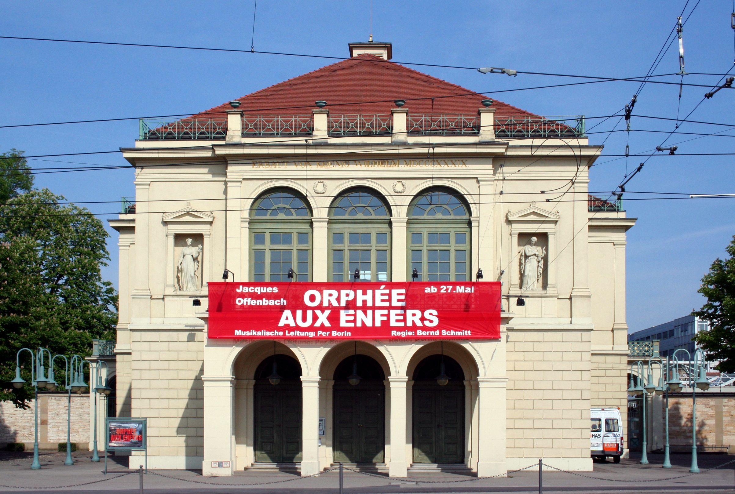 Wilhelma-Theater in Stuttgart-Bad Cannstatt, Baden-Württemberg